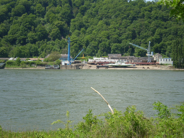 Werftzentrum Mittelrhein, Remagen-Oberwinter